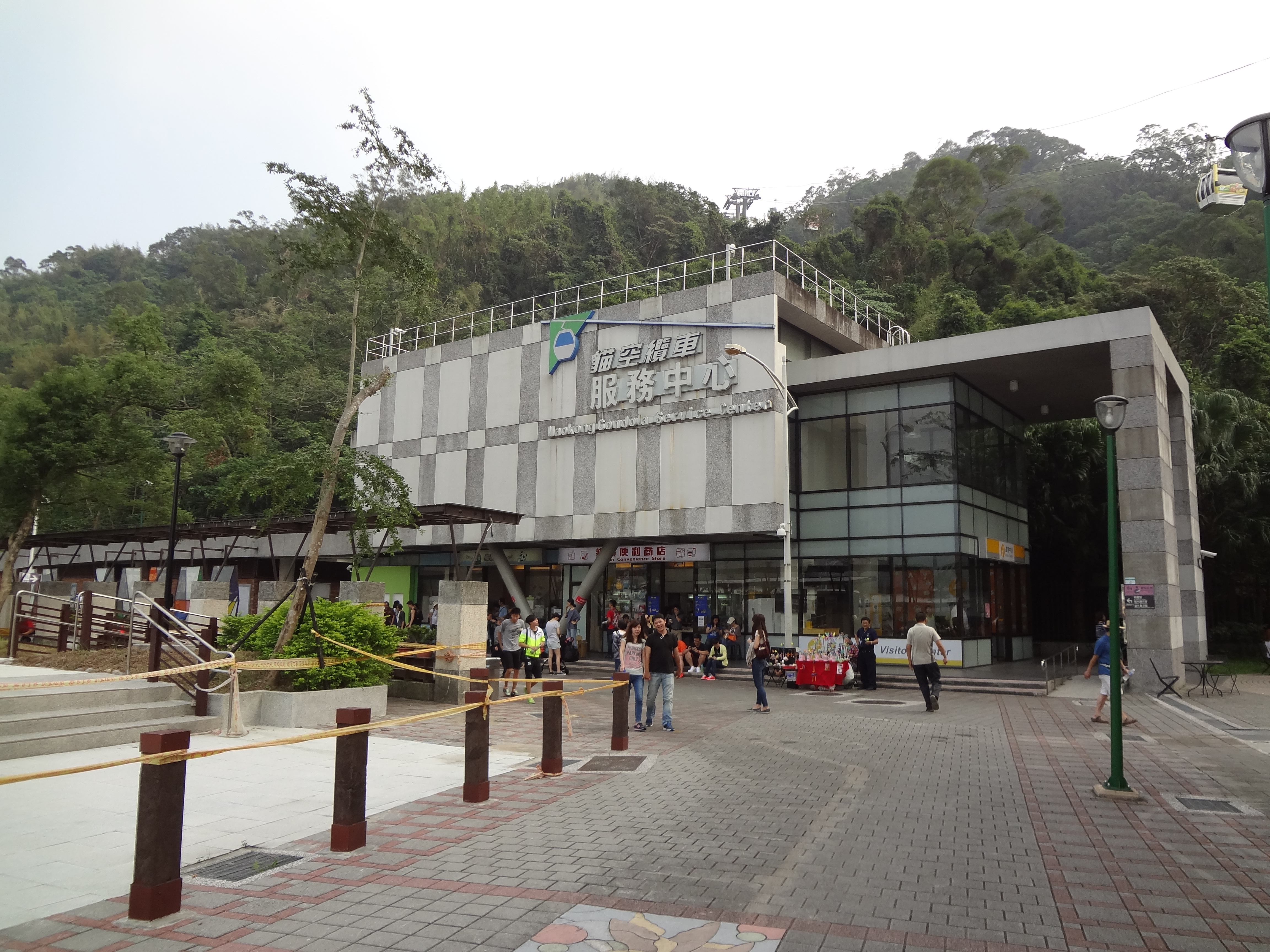 貓空纜車服務中心，位於臺灣臺北市文山區新光路二段10巷2號。